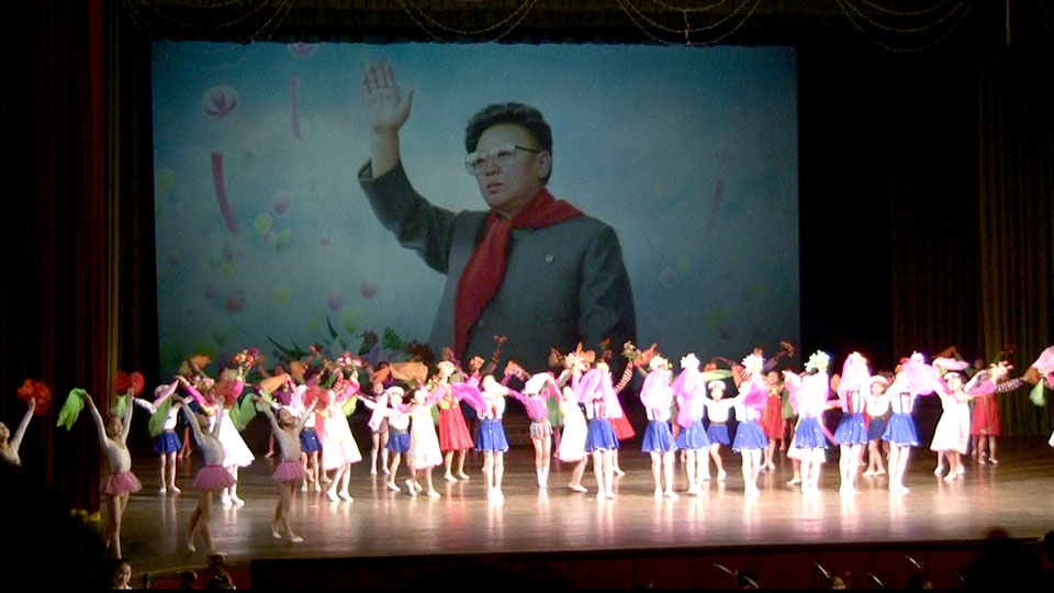 Mangyondae Schoolchildrens Palace in Pyongyang